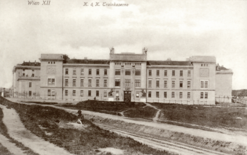 Meidlinger Trainkaserne, um 1904, Meidlinger Bezirksmuseum